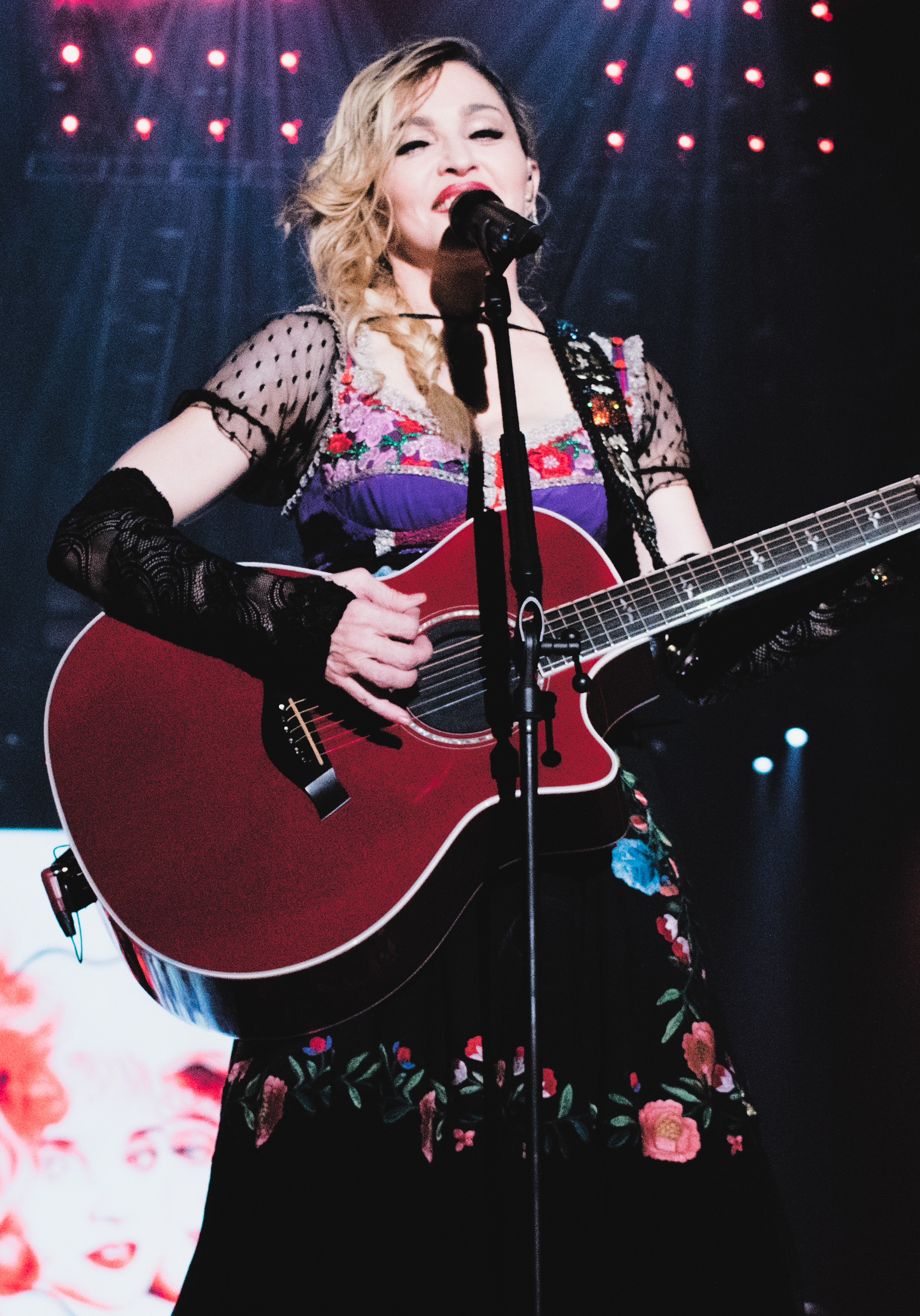 Philadelphia, PA